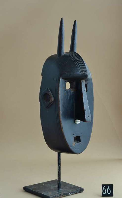 Maschera facciale Sulaw - Maschera antropozoomorfa di forma ovale, fronte bombata con corna, ampli occhi quadrati forati e lungo naso diritto che si allarga procedendo dall'alto verso il basso. Anche la bocca sporgente è forata e di forma quadrata. Le maschere sulaw rappresentano una "scimmia" (il colobo nero) e accompagnano gli iniziati della società Korè al loro rientro al villaggio al termine delle prove sostenute nello spazio iniziatico della boscaglia. Nell'iniziazione i giovani maschi vengono circoncisi, "uccisi al Koré" (Colleyn 1998) e rinascono come adulti; sottrarsi alla prova (alla fame, alla sete e ai maltrattamenti dei più anziani) significherebbe restare nel mondo delle donne. Un centro iniziatico raggruppa i giovani di più villaggi dando luogo a una rete di alleanze inter-comunitarie.